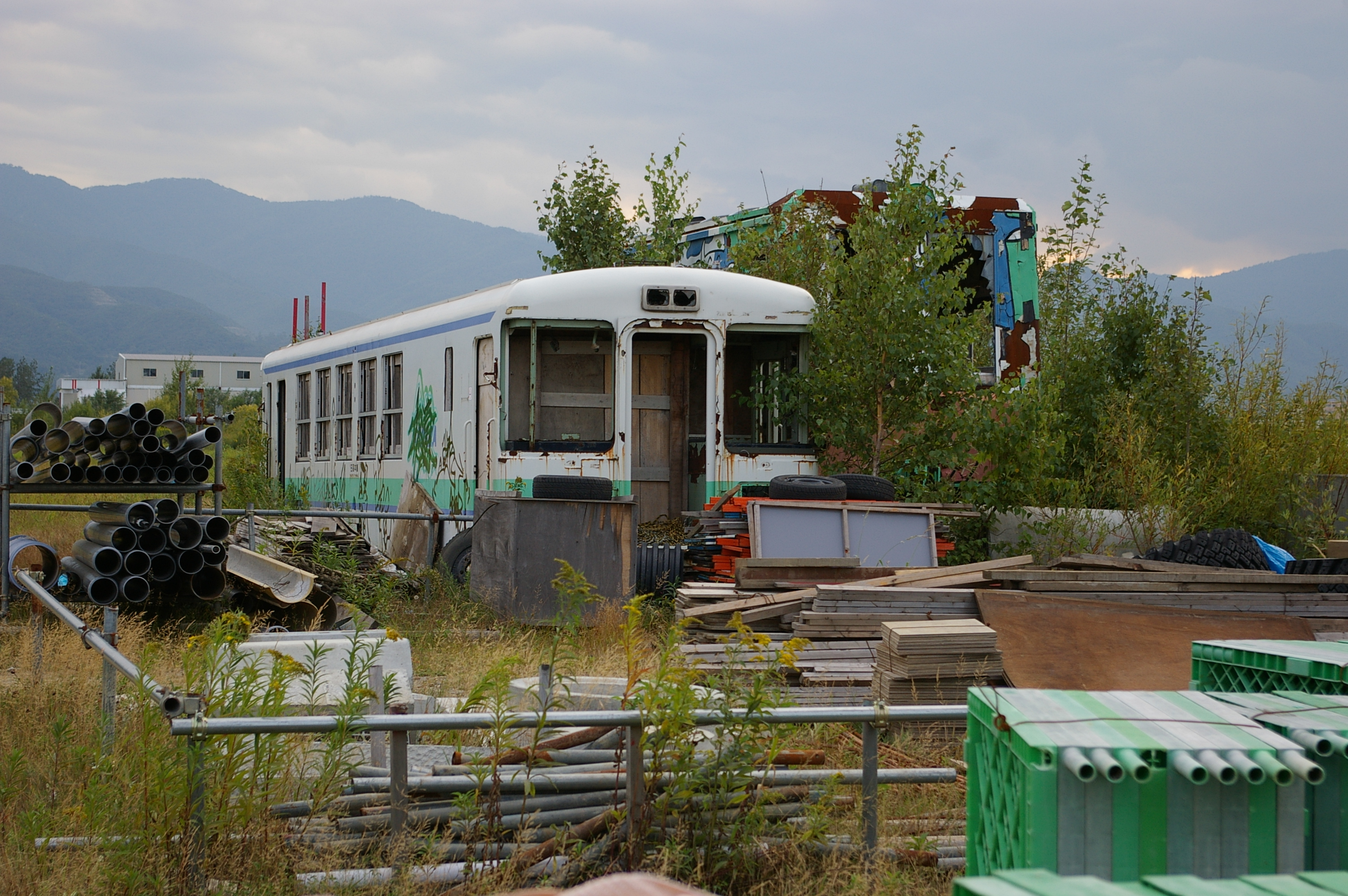 JR Hokkaido KIHA 130-5 left in Sapporo city, Hokkaido.